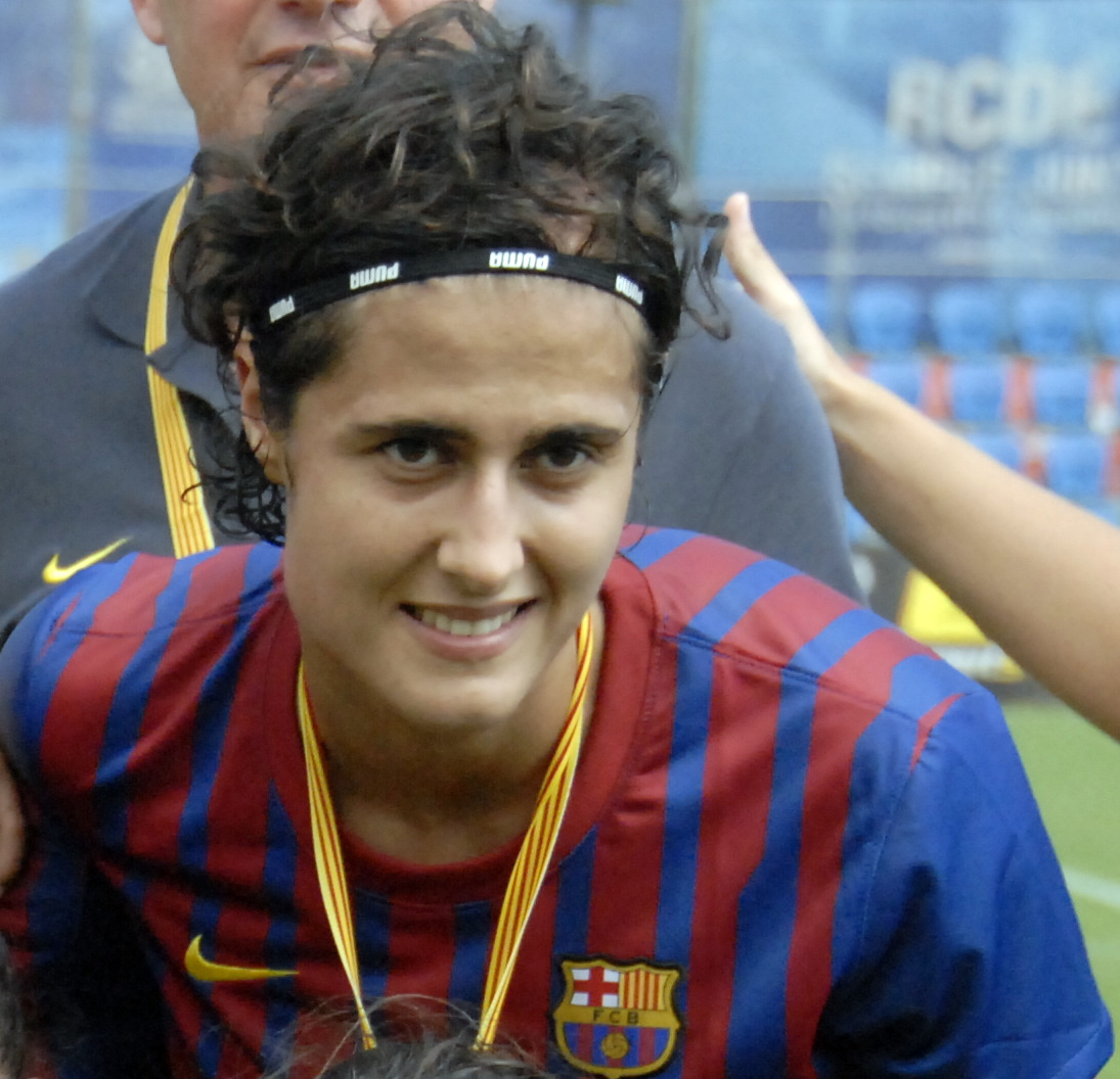 2011 Copa Catalunya (womens) final